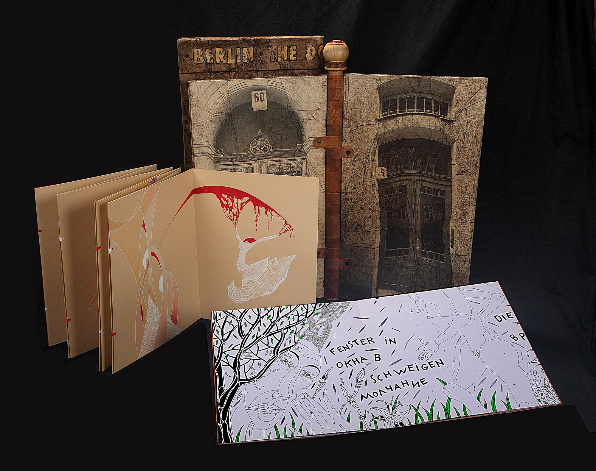 Werke der Gruppenmitglieder